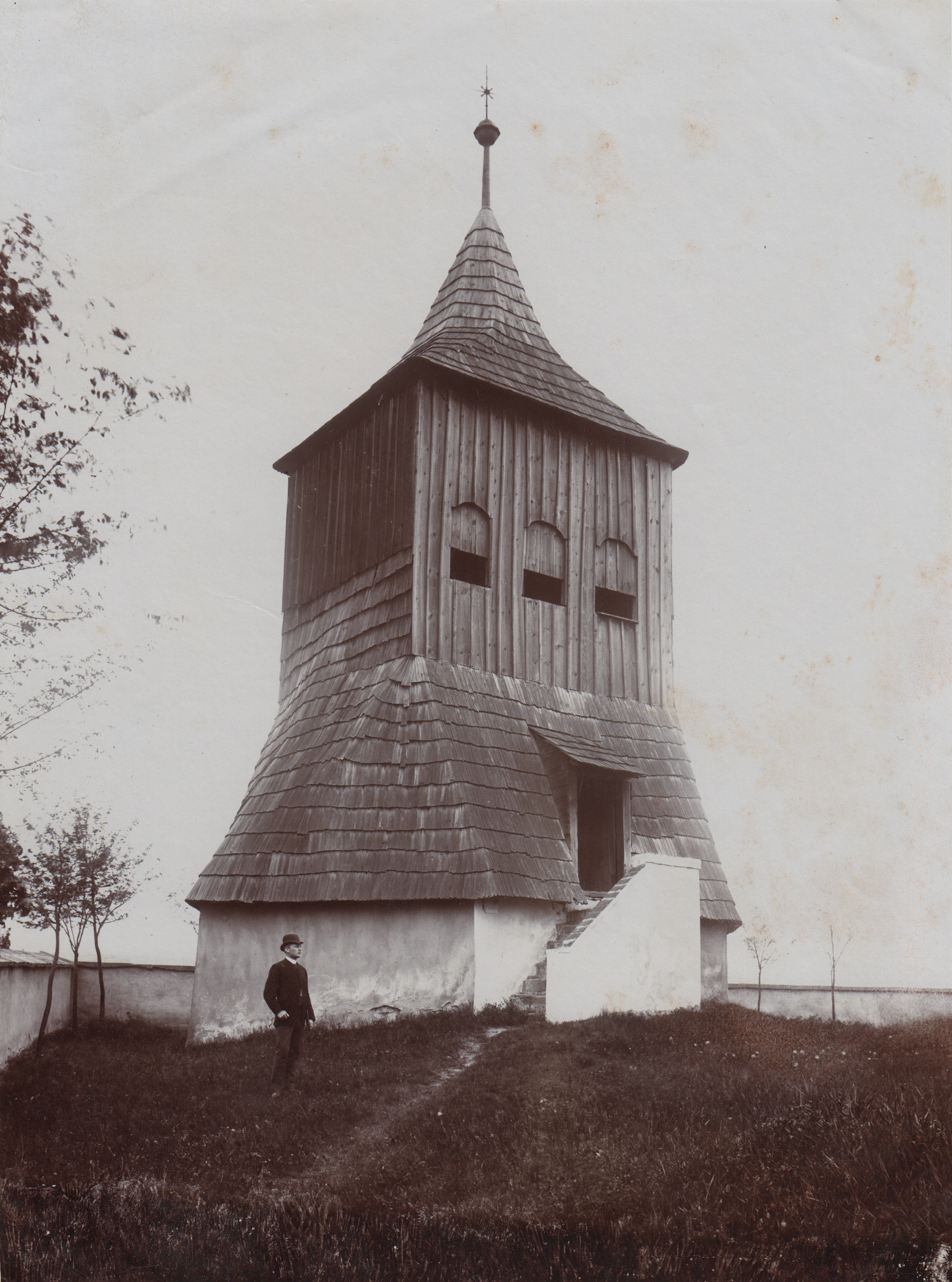 Zvonice v areálu kostela svatých Petra a Pavla v Přelíci.